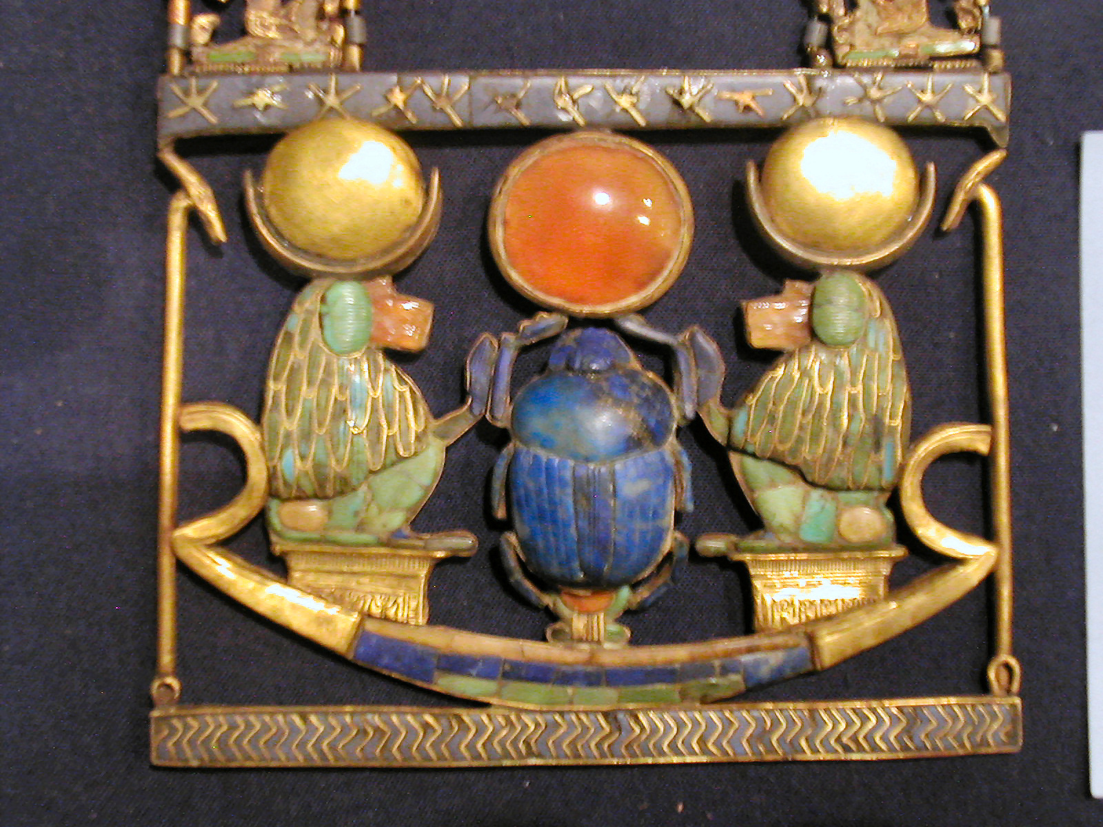 Pectoral ou pendentif partiel de Toutankhamon.